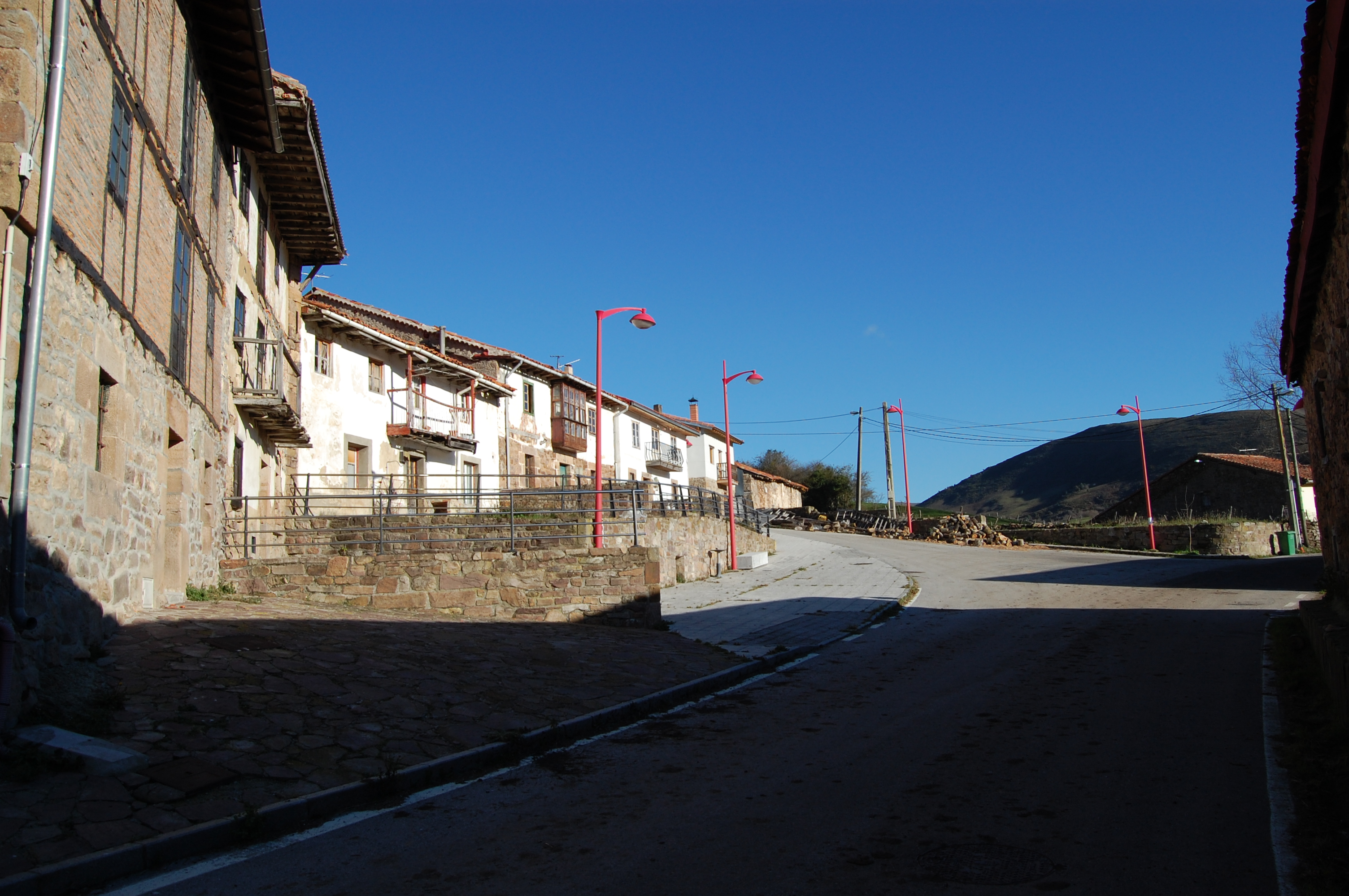 San Miguel de Aguayo